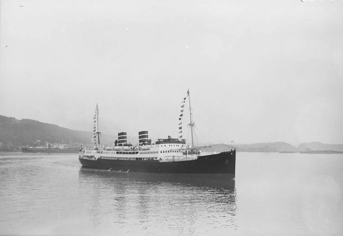 Bildet er hentet fra Nasjonalbibliotekets bildesamling. Anmerkninger til bildet var: Gamle skuter